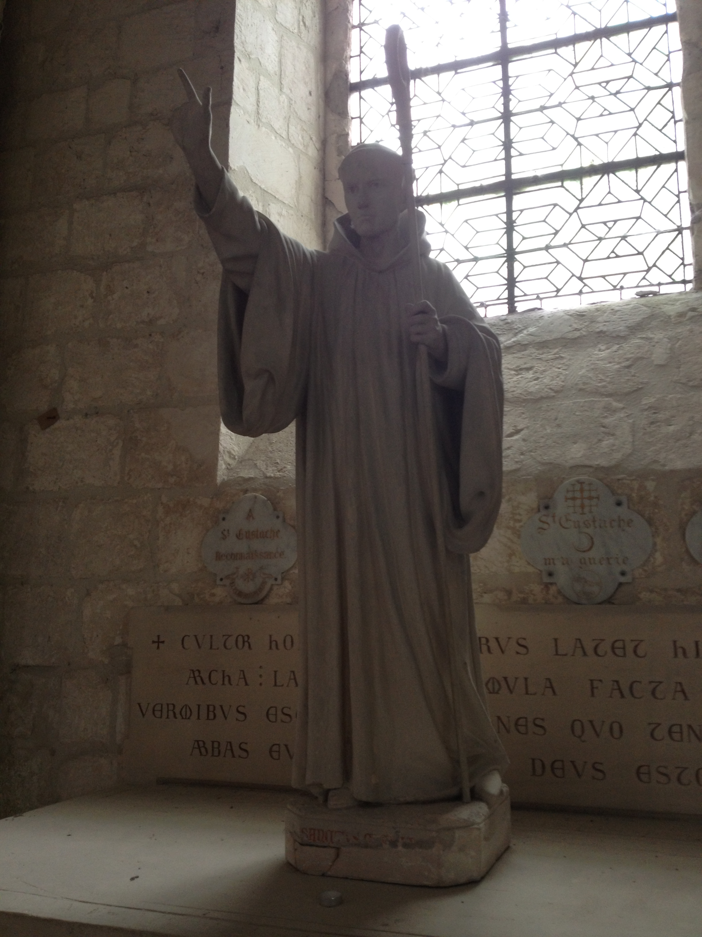 Saint Eustache, abbé de Fly (1200-1211).